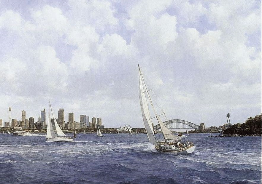 Olieverf schilderij Peter J Sterkenburg